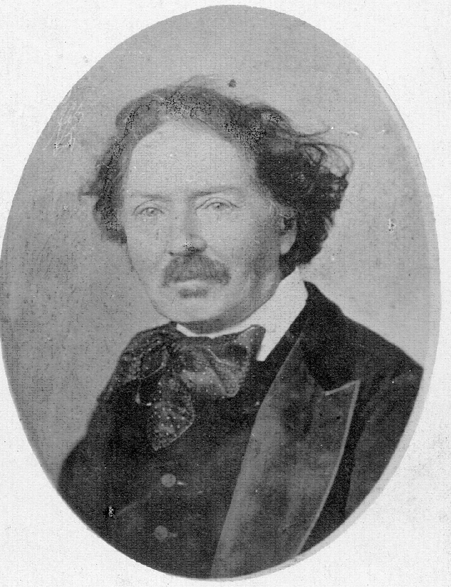 Portrait von German Mäurer vor 1864